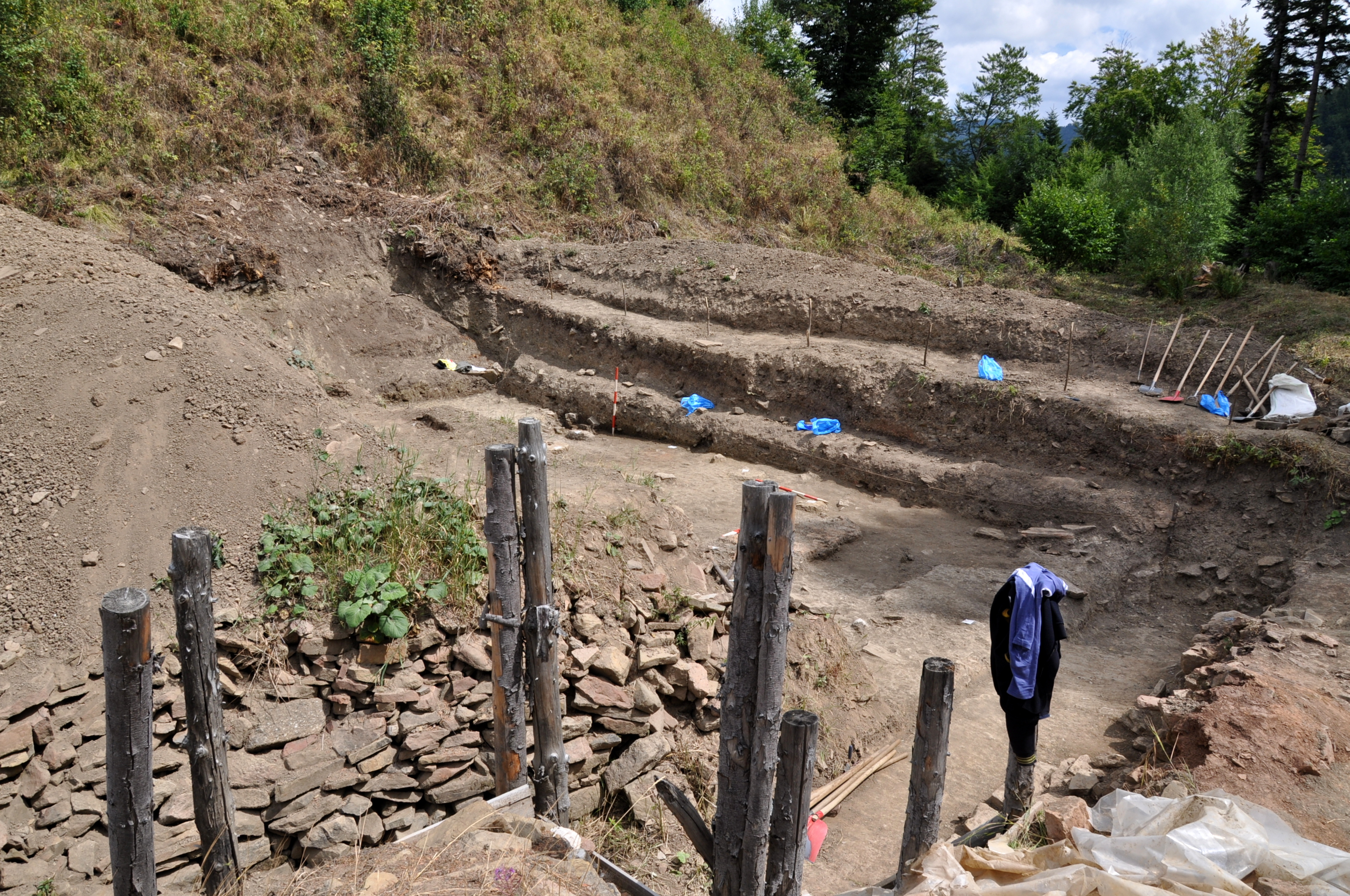 Situl arheologic de la Covasna, "Cetatea Zânelor"